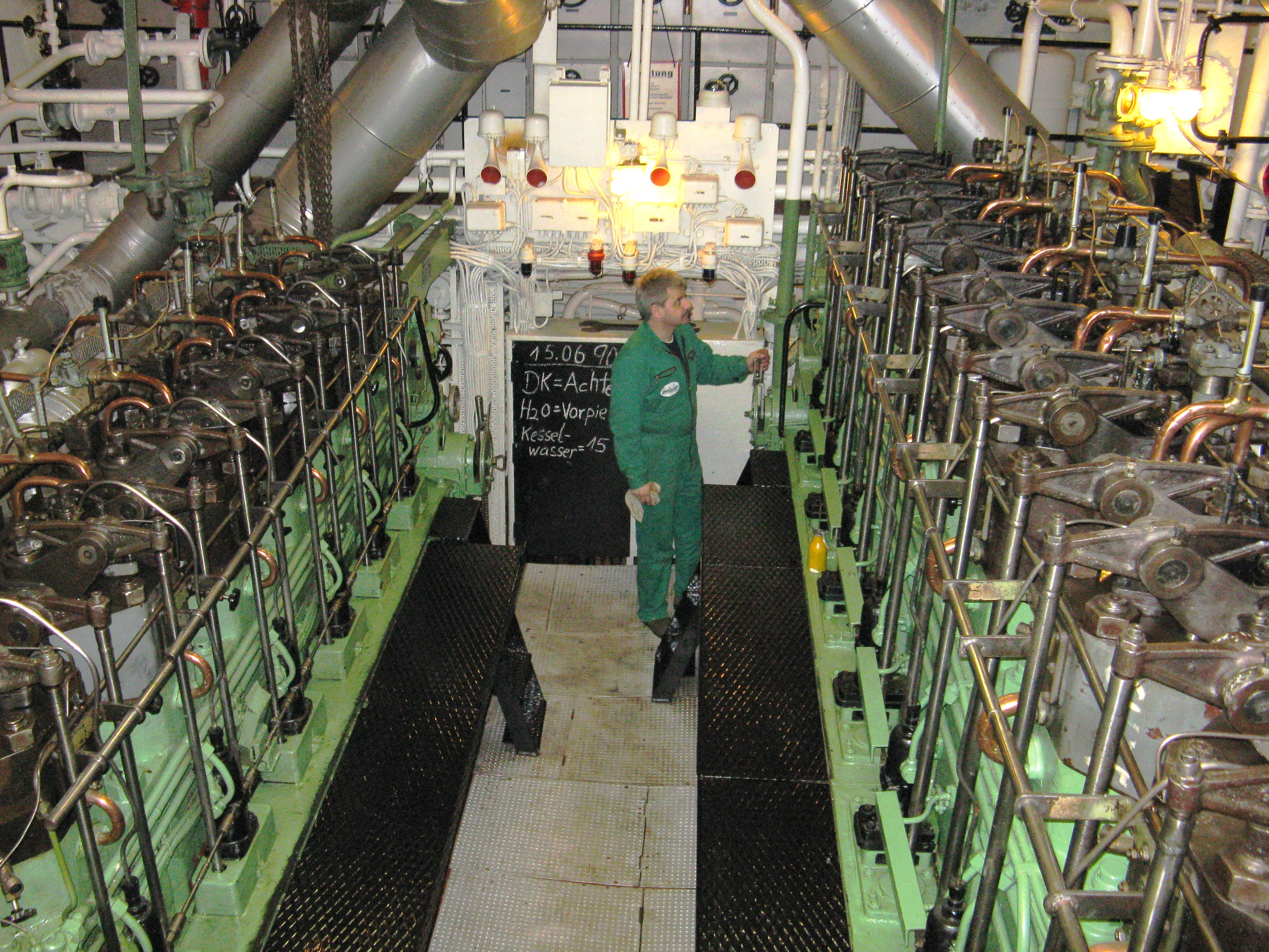 Blick in den Maschinenraum